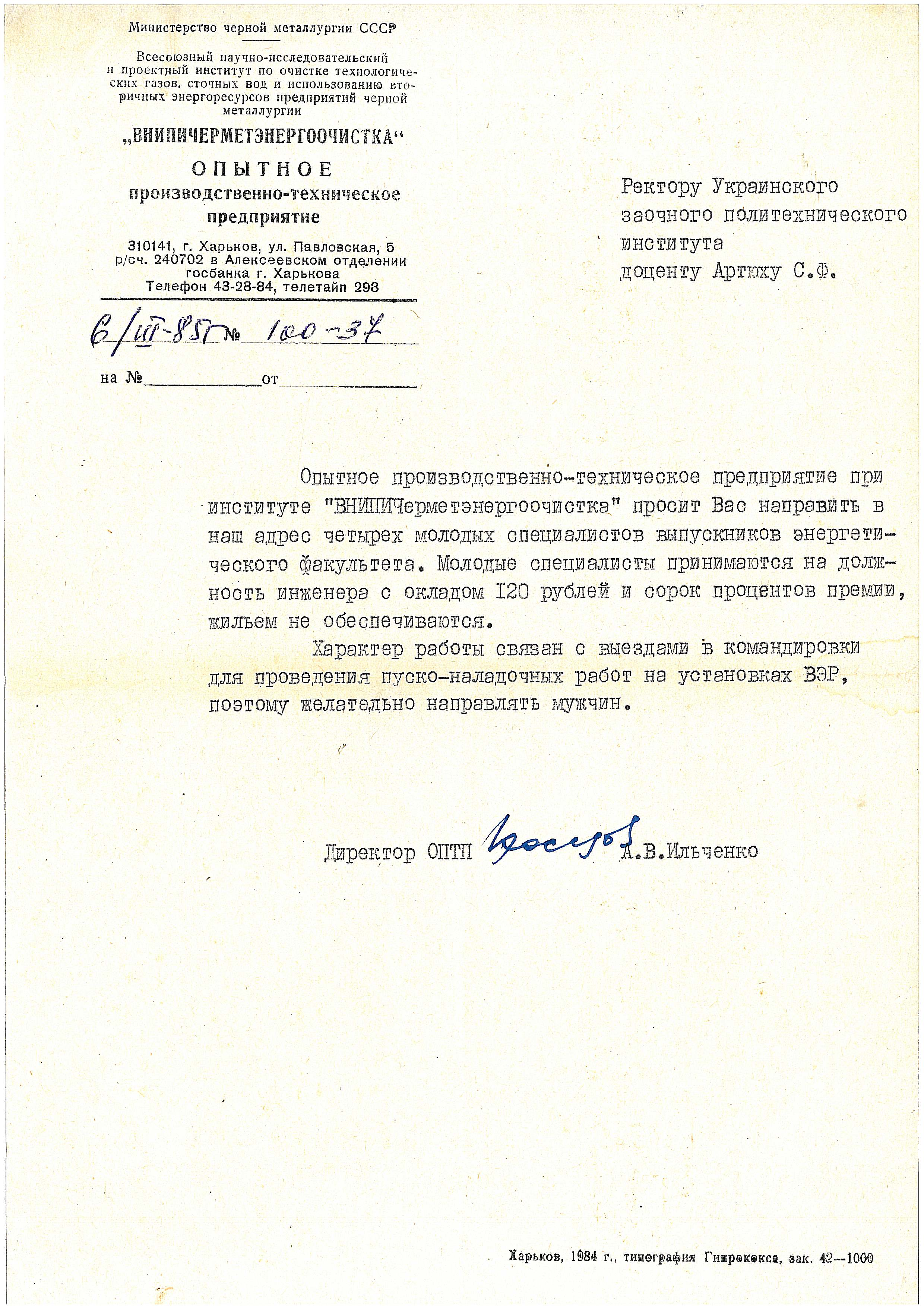 Заявка в УЗПИ на распределение 4 молодых специалистов от Внипичерметэнергоочистки, Харьков, Министерство чёрной металлургии СССР.